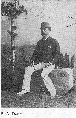 portret van de schrijver Paul Adriaan Daum